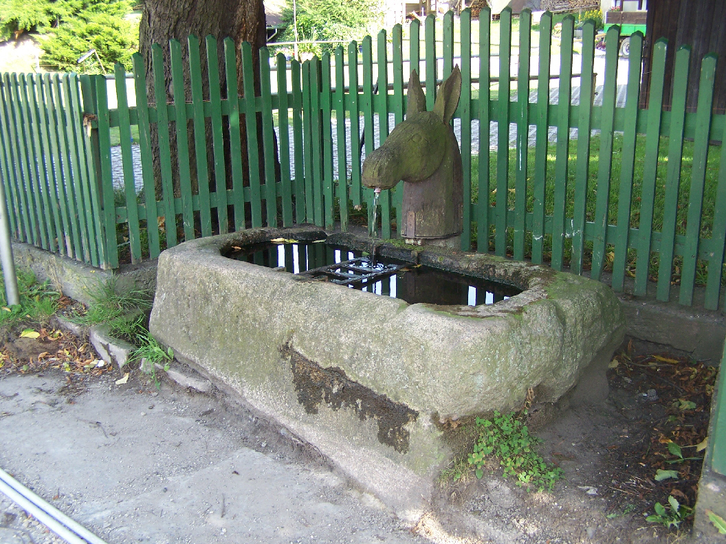 Am Dorfbrunnen in Schönau.